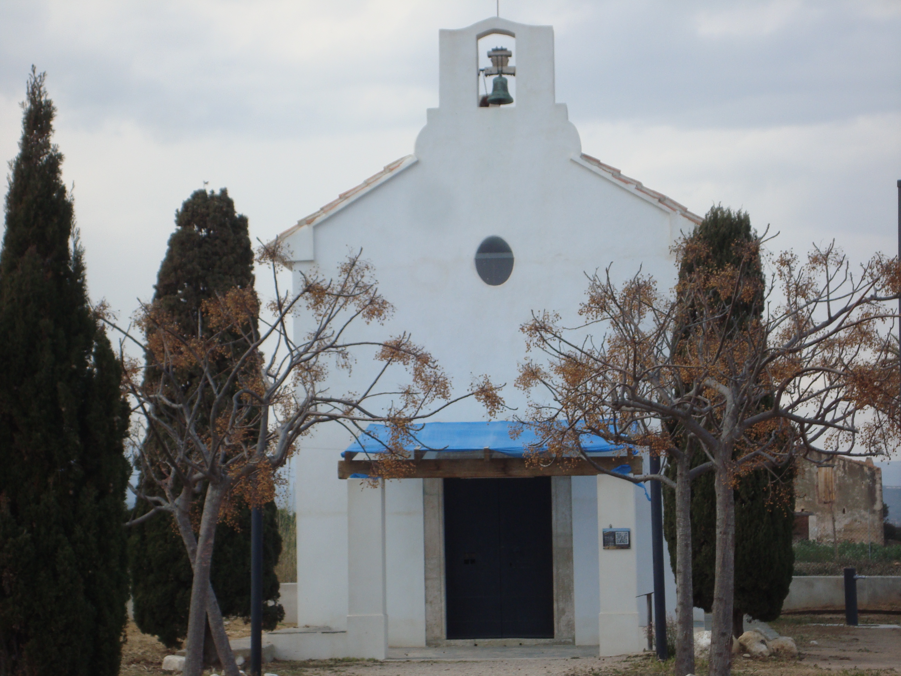 Ermita de Sant Antoni de Pàdua (Alcalà de Xivert) 03.004-009.